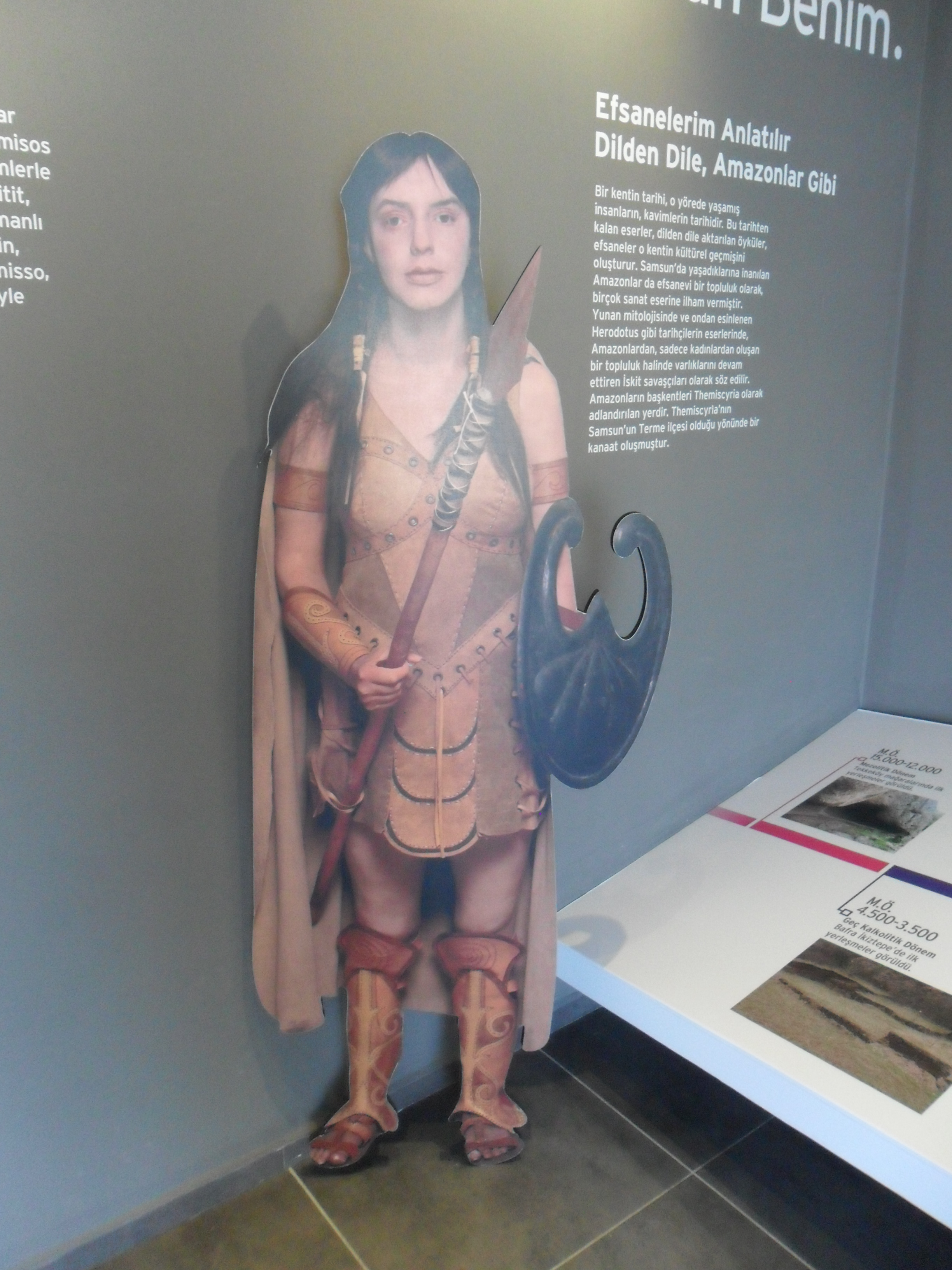 Samsun Kent Müzesi'nde yer alan bir Amazon maketi.